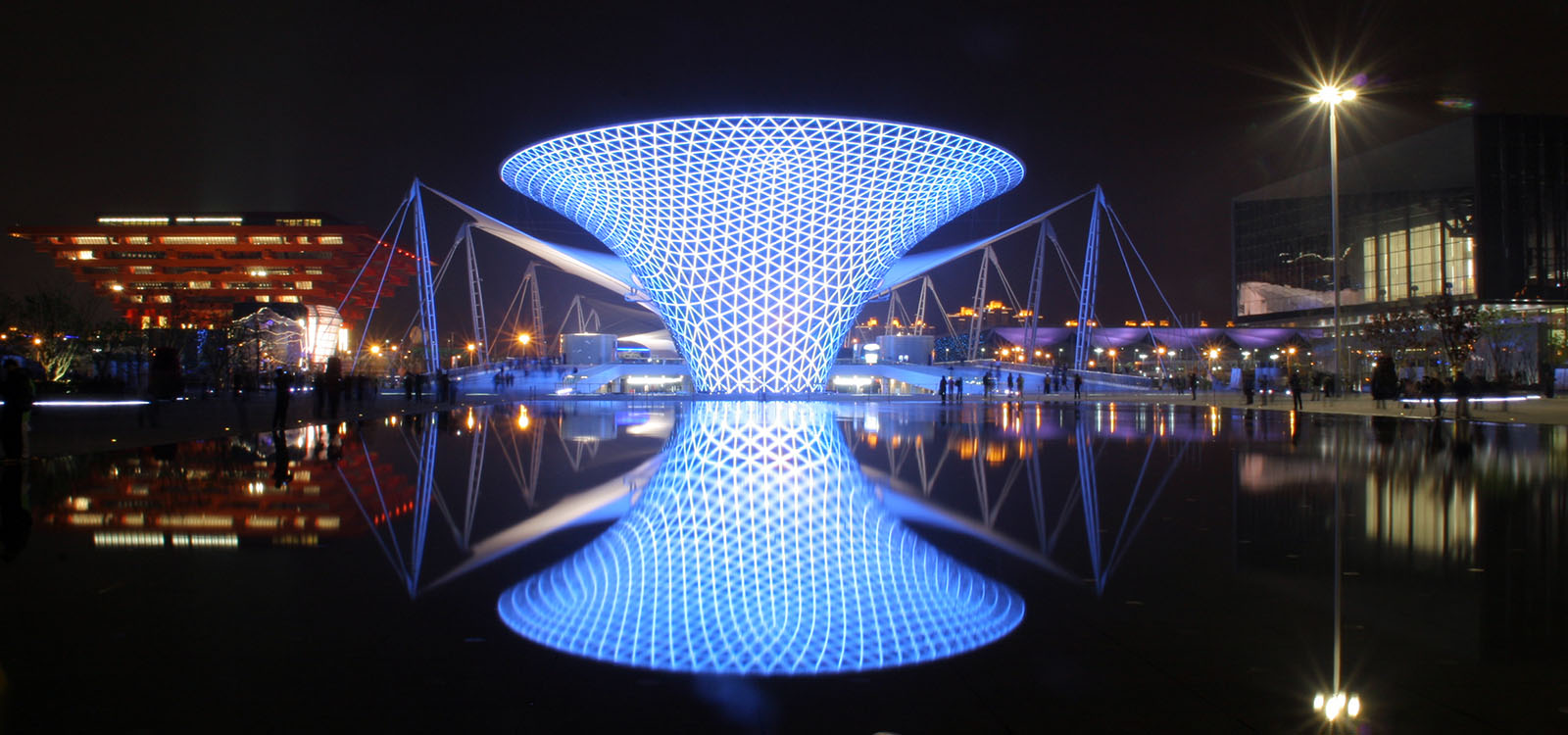 Expo Axis building at Shanghai's